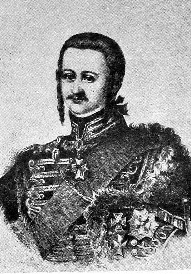 Это изображение было использовано для иллюстрирования статьи «Зорич, Семен Гаврилович» опубликованной в десятом томе «Военной энциклопедии», который был издан книгоиздательским товариществом И. Д. Сытина в 1912—1913 гг. в столице Российской империи городе Санкт-Петербурге.